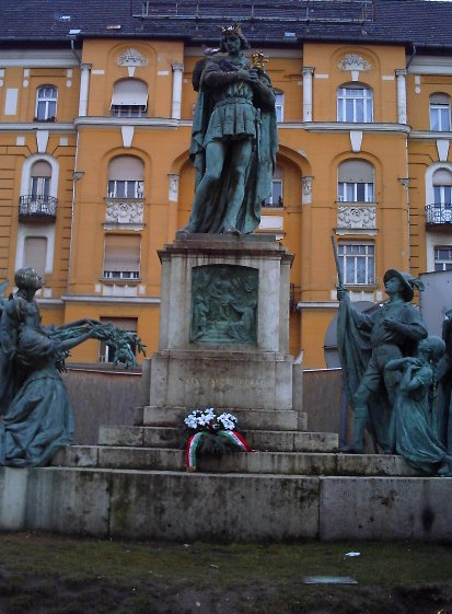 Szent Imre szobra a Móricz Zsigmond körtéren. Kisfaludi Strobl Zsigmond alkotása (1930)